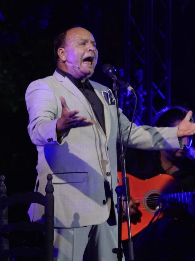 Encuentro inédito, ayer jueves 27 de julio, en el auditorio al aire libre del Parque Lineal del Manzanares, de dos grandes voces del flamenco actual, El Pele y Pedro El Granaíno, al que se sumó la bailaora Pastora Galván.